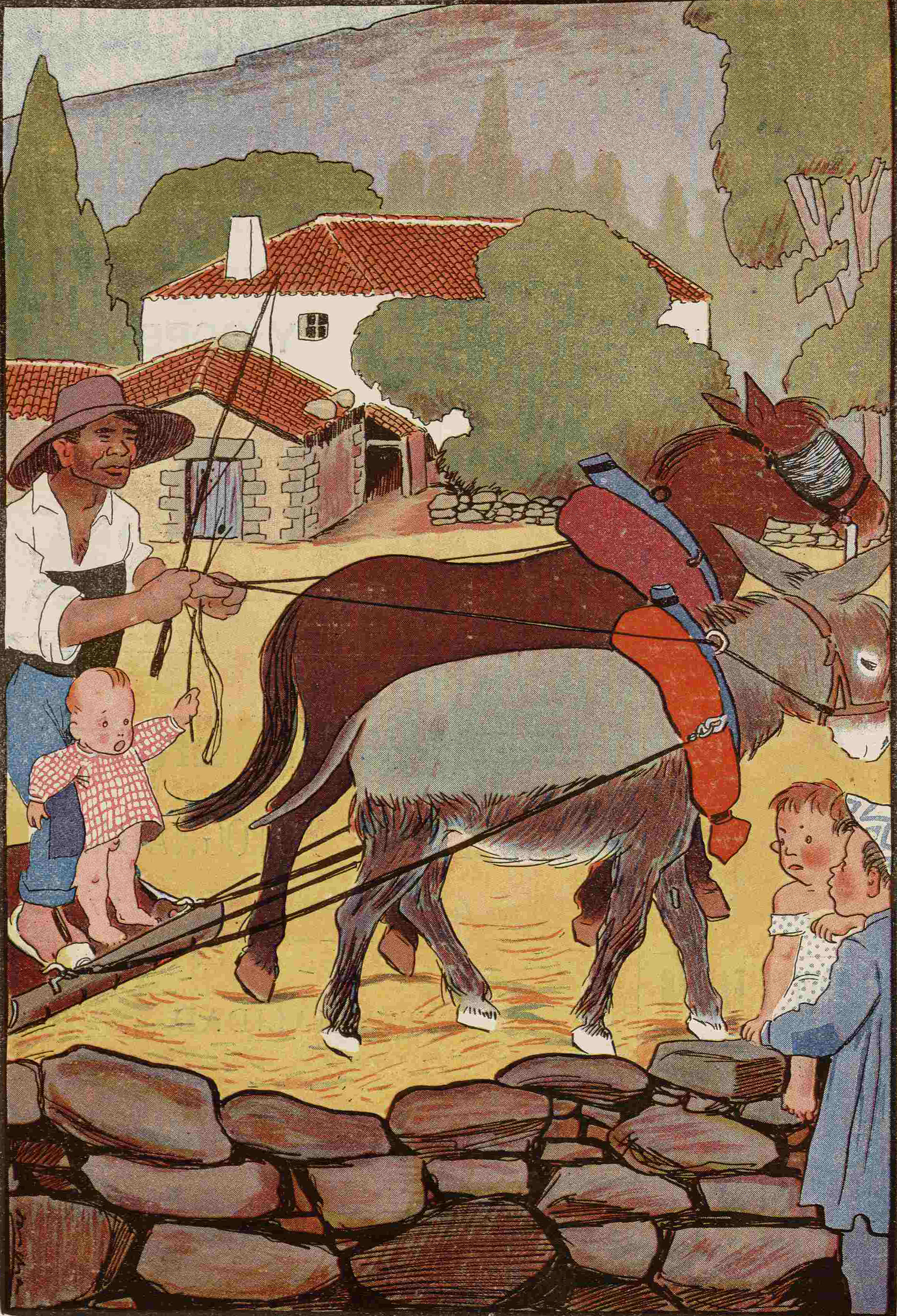 En las eras.